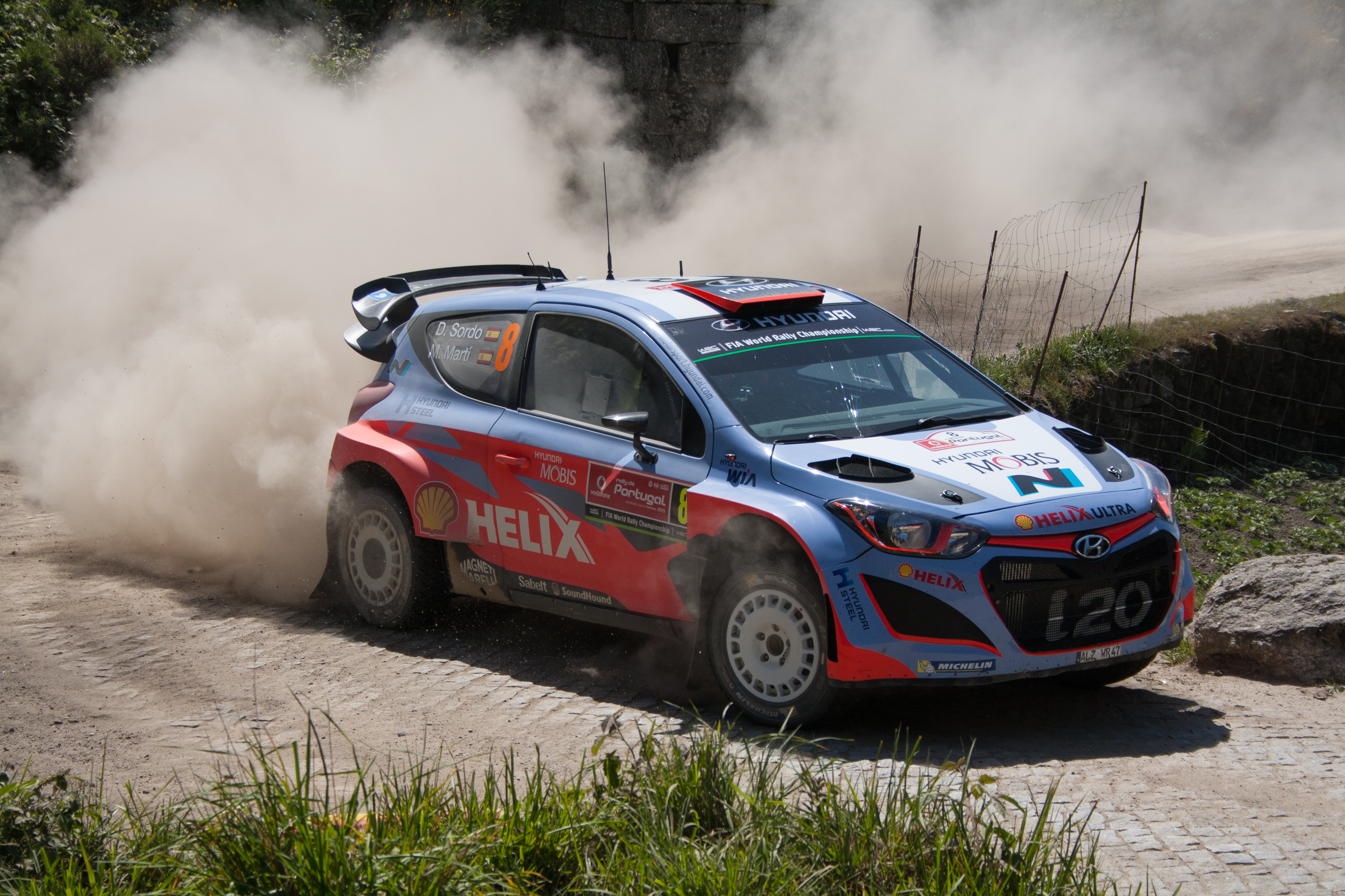 D. Sordo - M. Martí